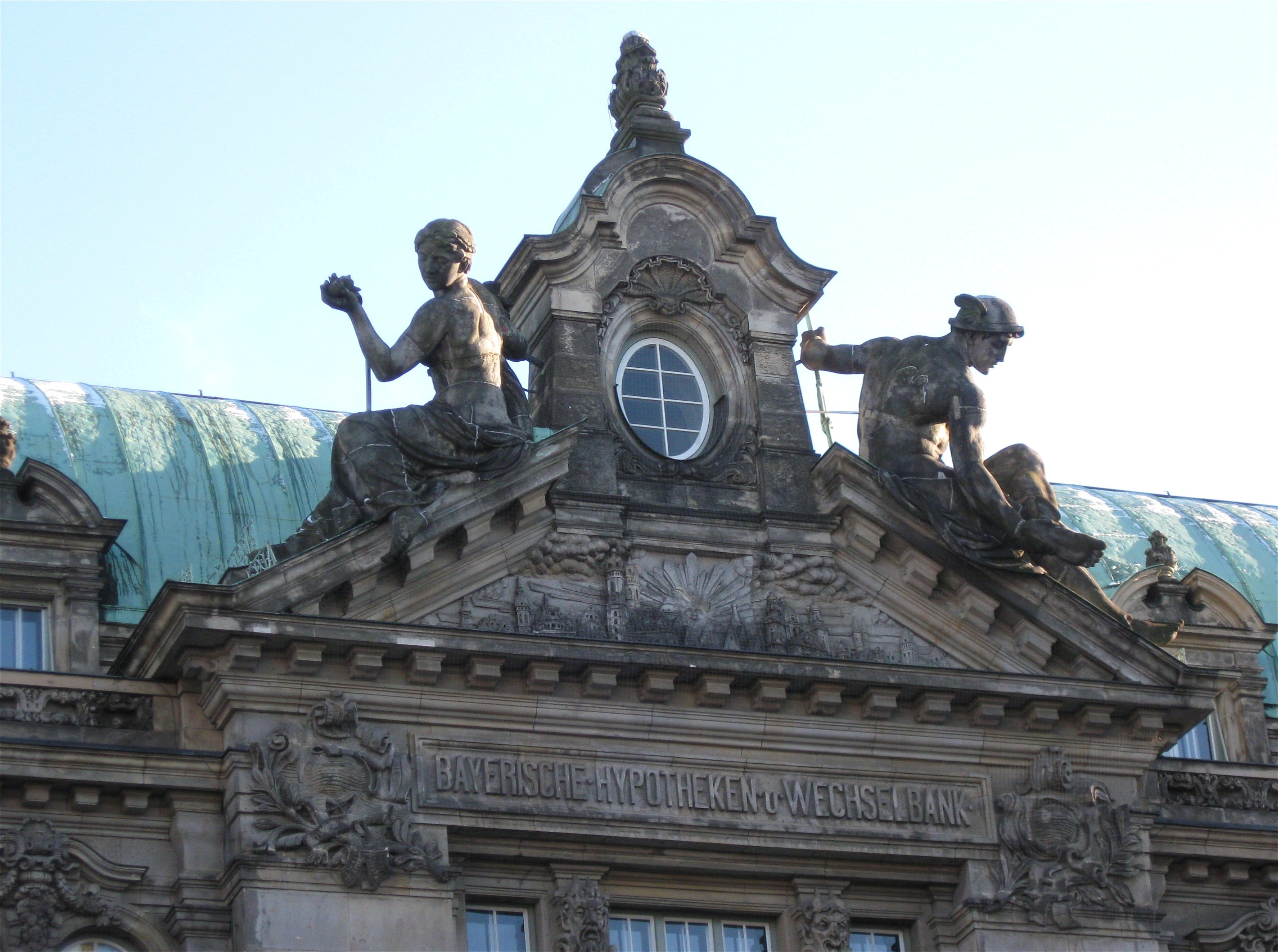 Kardinal-Faulhaber-Straße 10; (Hypo-Vereinsbank), Westflügel, monumentaler Neubarockbau, 1895-96 von Emil Schmidt, mit reichem plastischem Schmuck von Hugo Kaufmann